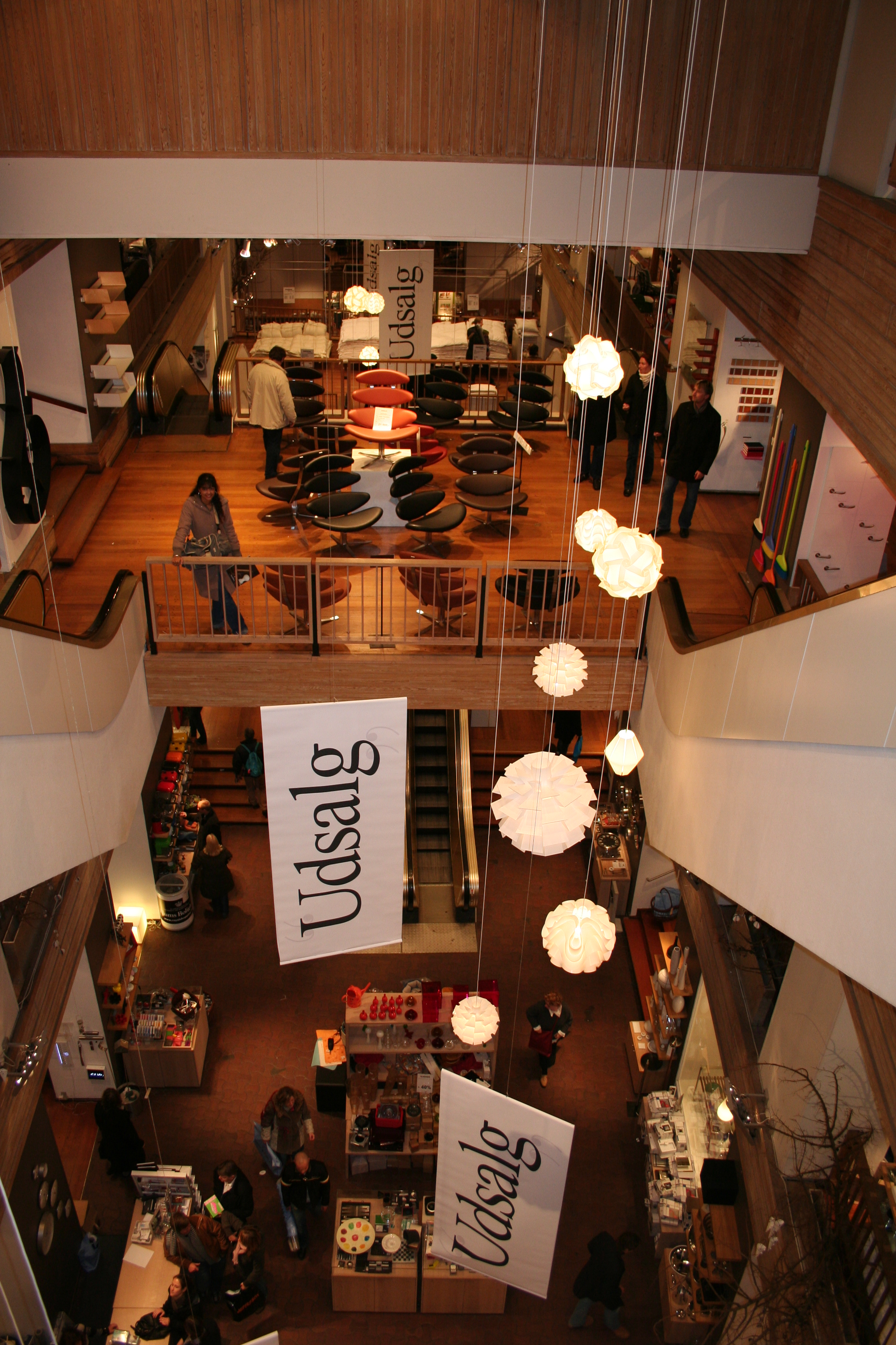 L'intérieur d'Illums Bolighus à Copenhague, au Danemark.